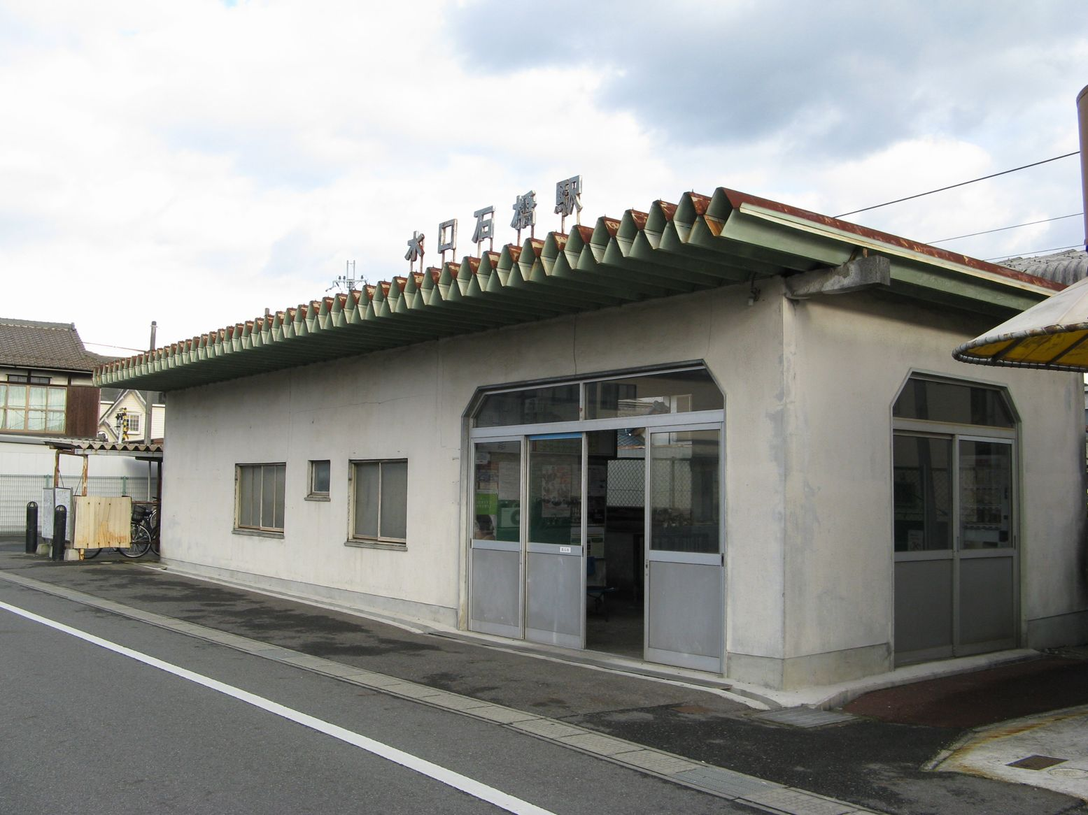 近江鉄道水口石橋駅 駅舎